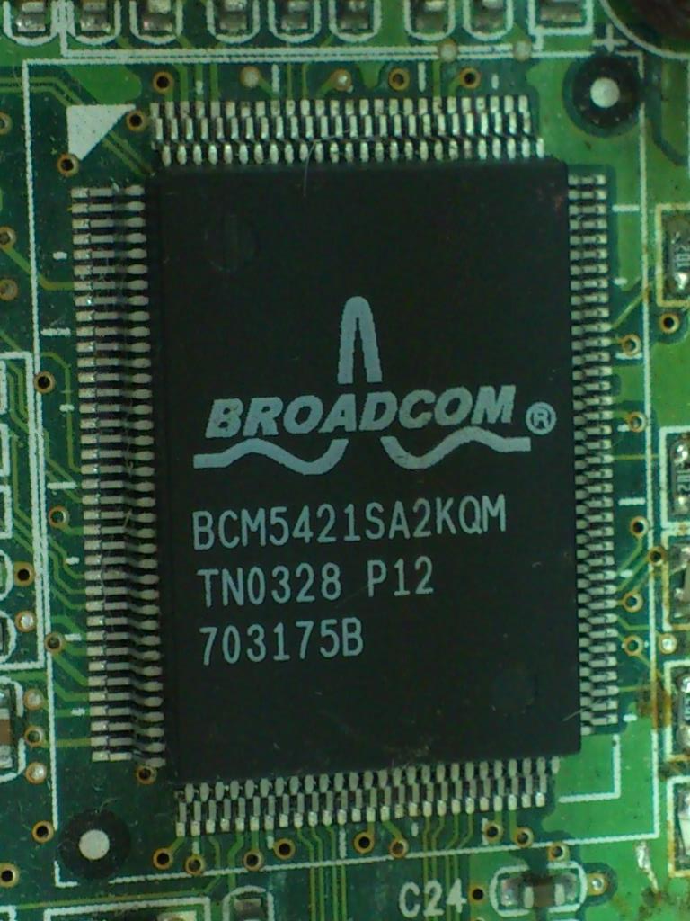 博通網路晶片BCM5421SA2KQM